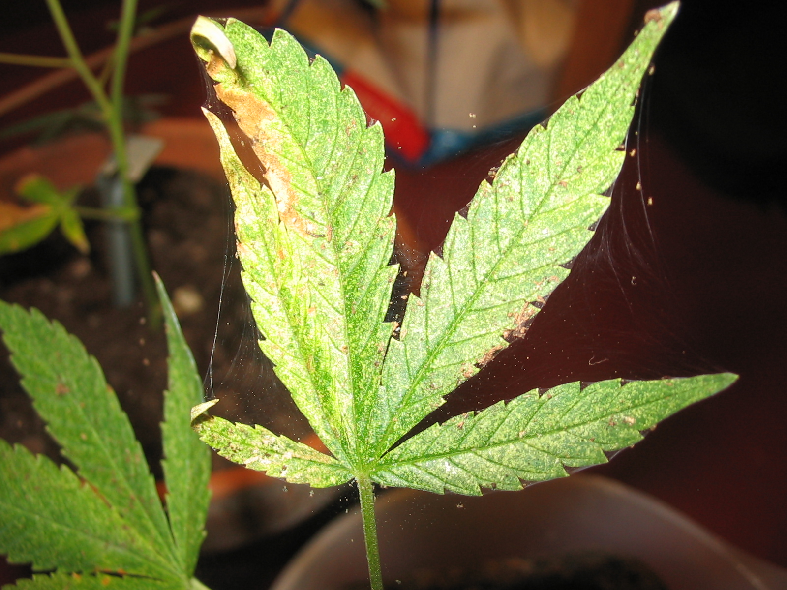 Bladaantasting op Cannabis Sativa plant door Spint. Het 'web' is duidelijk zichtbaar. De foto is genomen van de bovenkant van het blad.